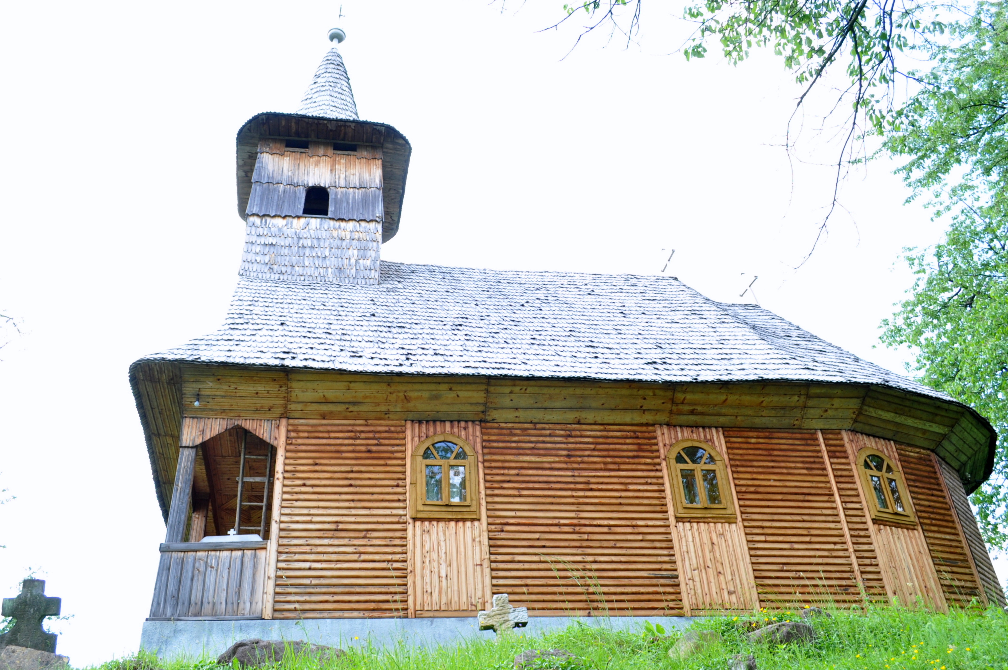 Biserica de lemn "Cuvioasa Paraschiva", sat IZVOARELE; comuna CERNEŞTI